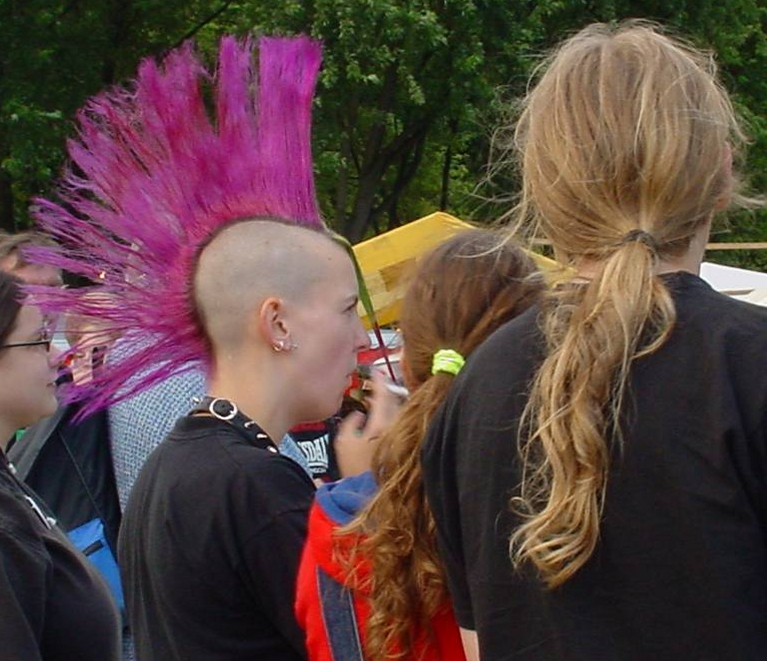 Punkundpferdeschwanz